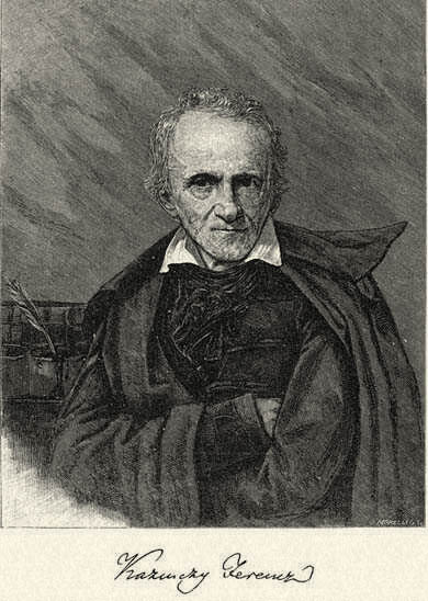 Kazinczy Ferenc (1759–1831) író, költő, a Magyar Tudományos Akadémia tagja. Morelli Gusztáv fametszete. Megjelent Az Osztrák-Magyar Monarchia írásban és képben (1887–1901) kiadványban